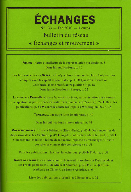 Echanges n°133, été 2010. Première page de couverture. Bulletin du réseau "Echanges et mouvement". BP 241, 75866 Paris Cedex 18, France.